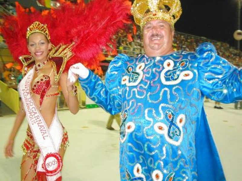 (portuguese) Rei Momo do Carnaval de Florianópolis, SC, Brasil em 2005